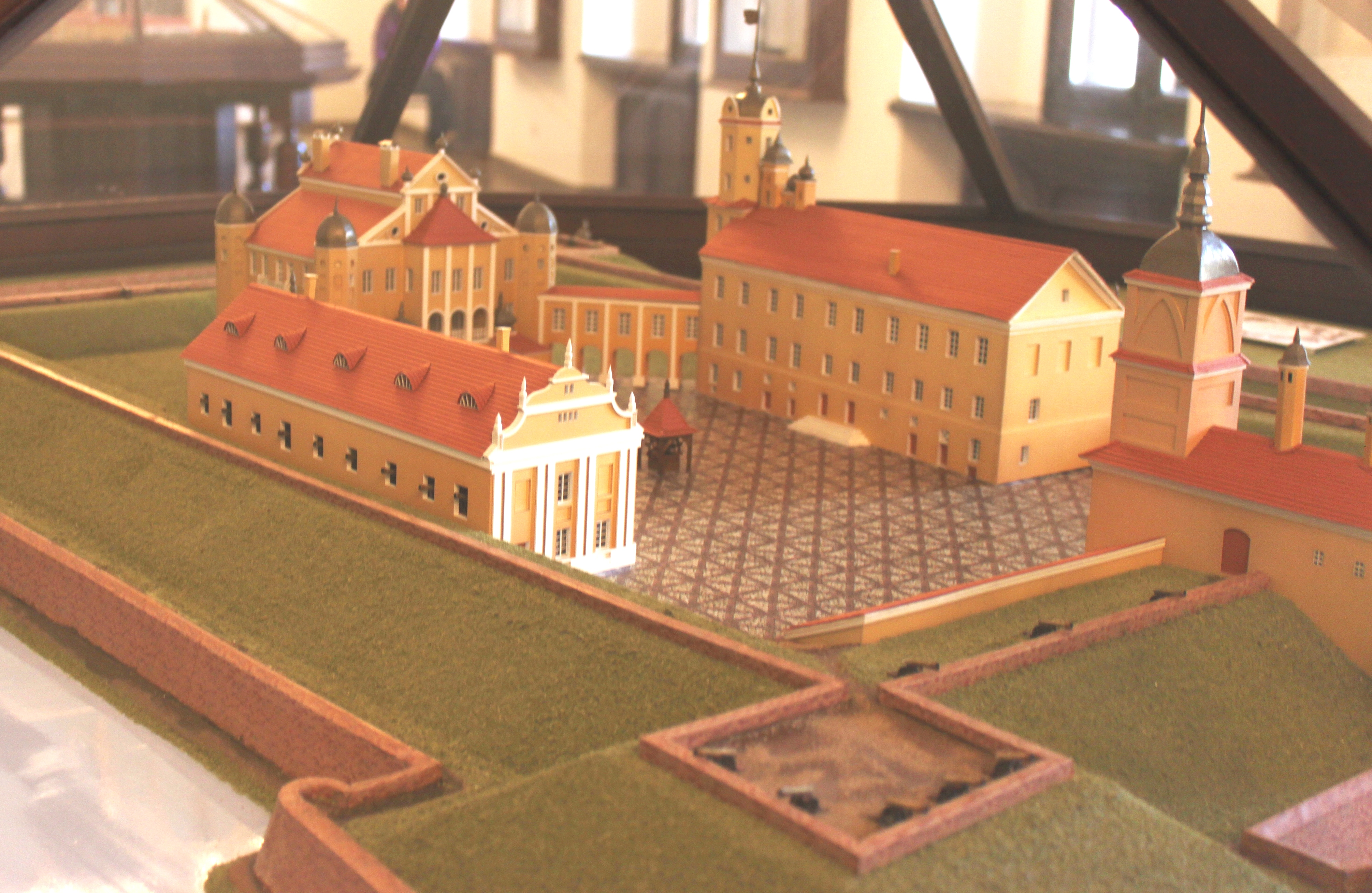 Беларуская (тарашкевіца): Макет замку ў Нясвіжу.